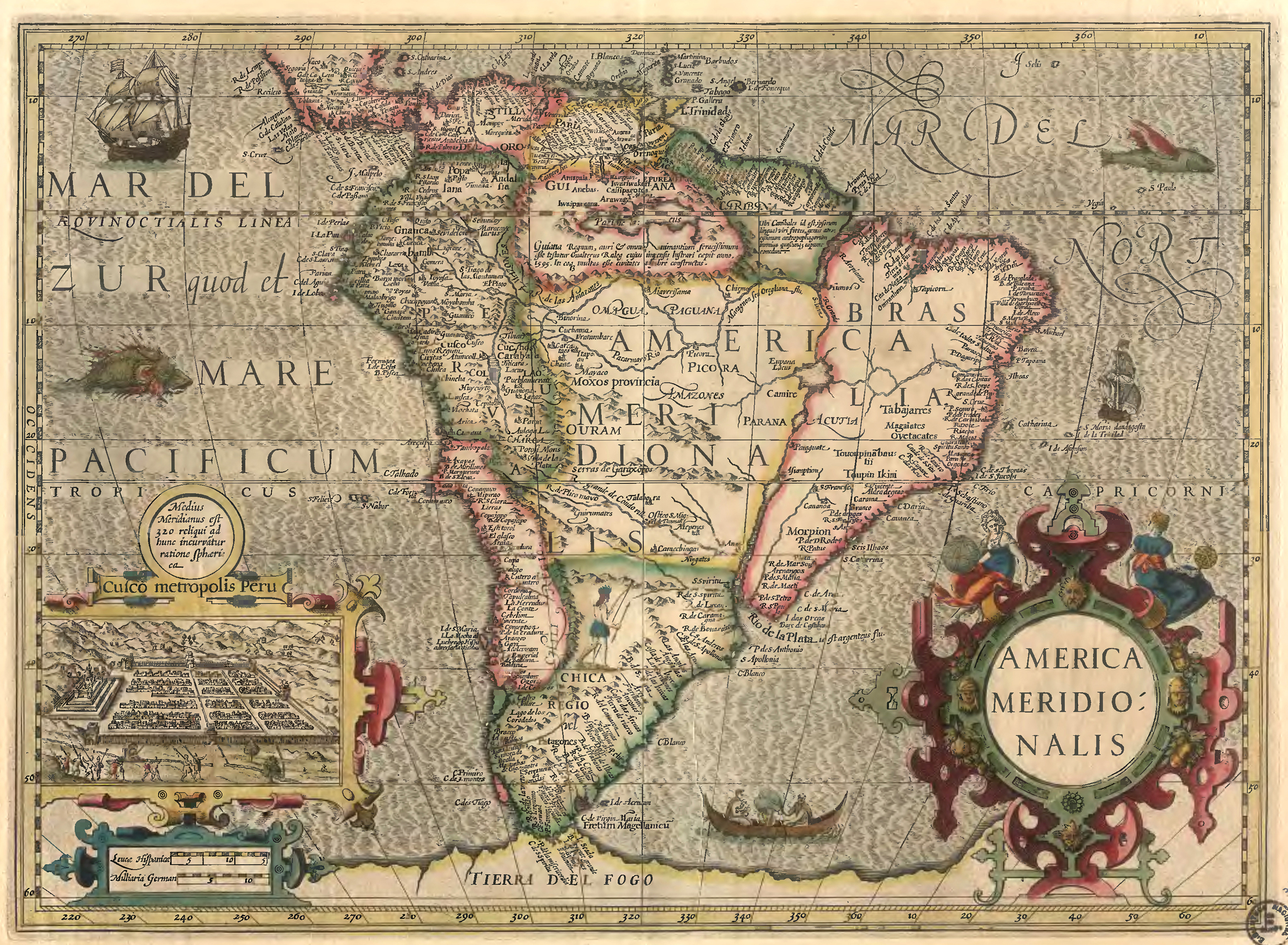 America meridionalis size: 35,8 x 49,5 cm